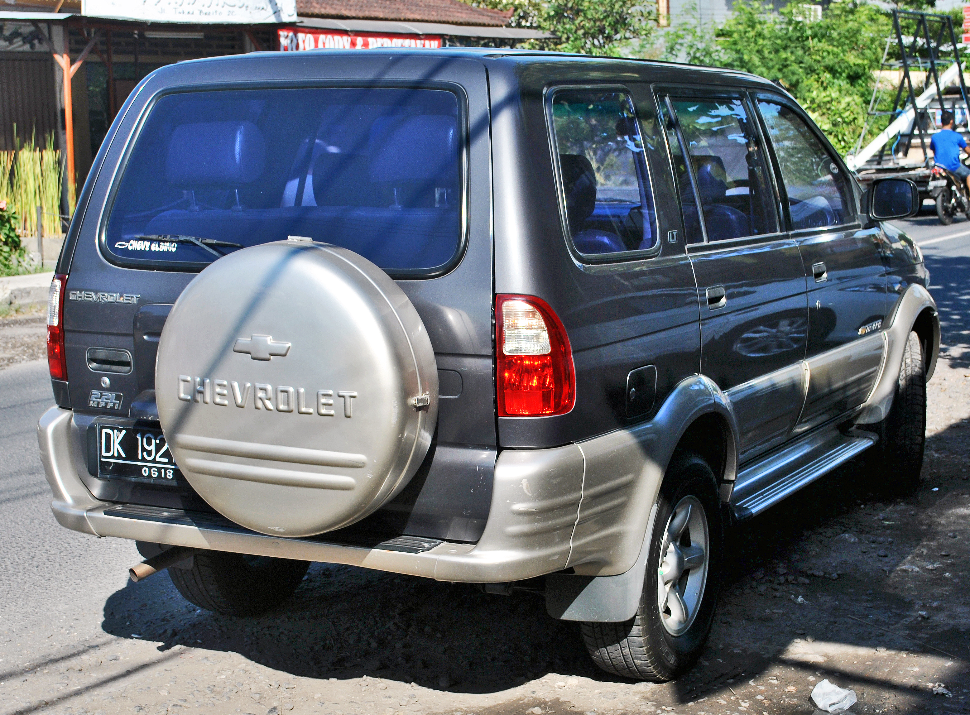 Bagian belakang kanan Chevrolet Tavera 2.2, di Panjer, Denpasar, Bali.